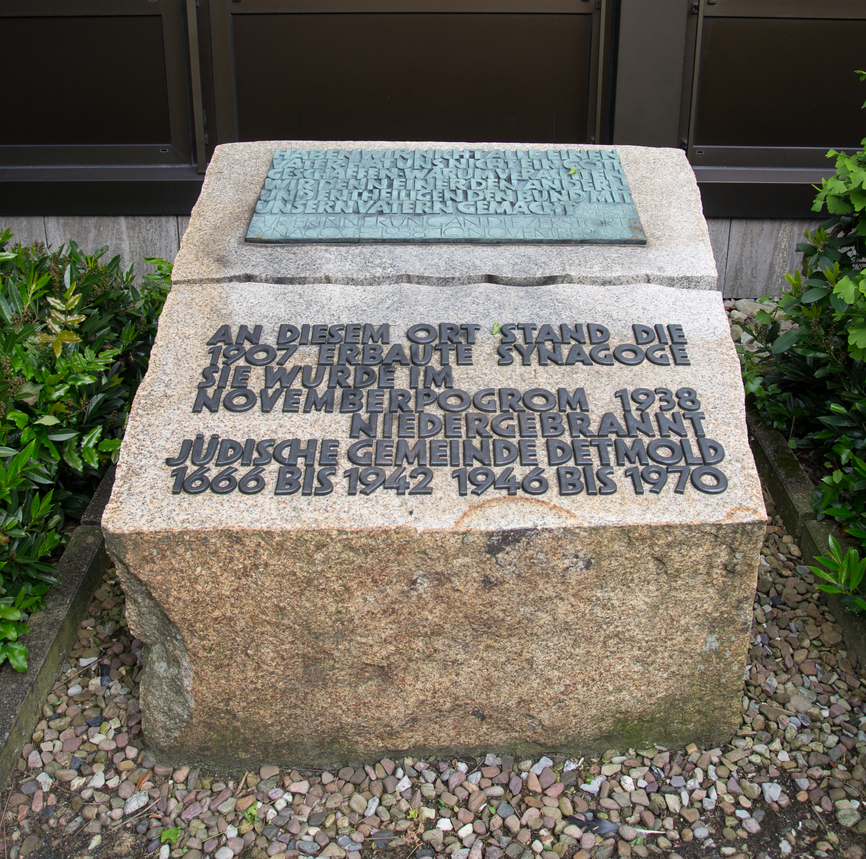 Gedenkstein für die 1938 von den Nationalsozialisten zerstörte Synagoge in Detmold